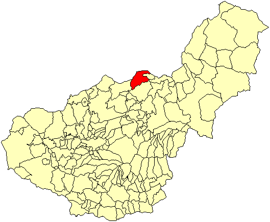 Situación del término municipal de Alamedilla respecto a la provincia de Granada, en España.